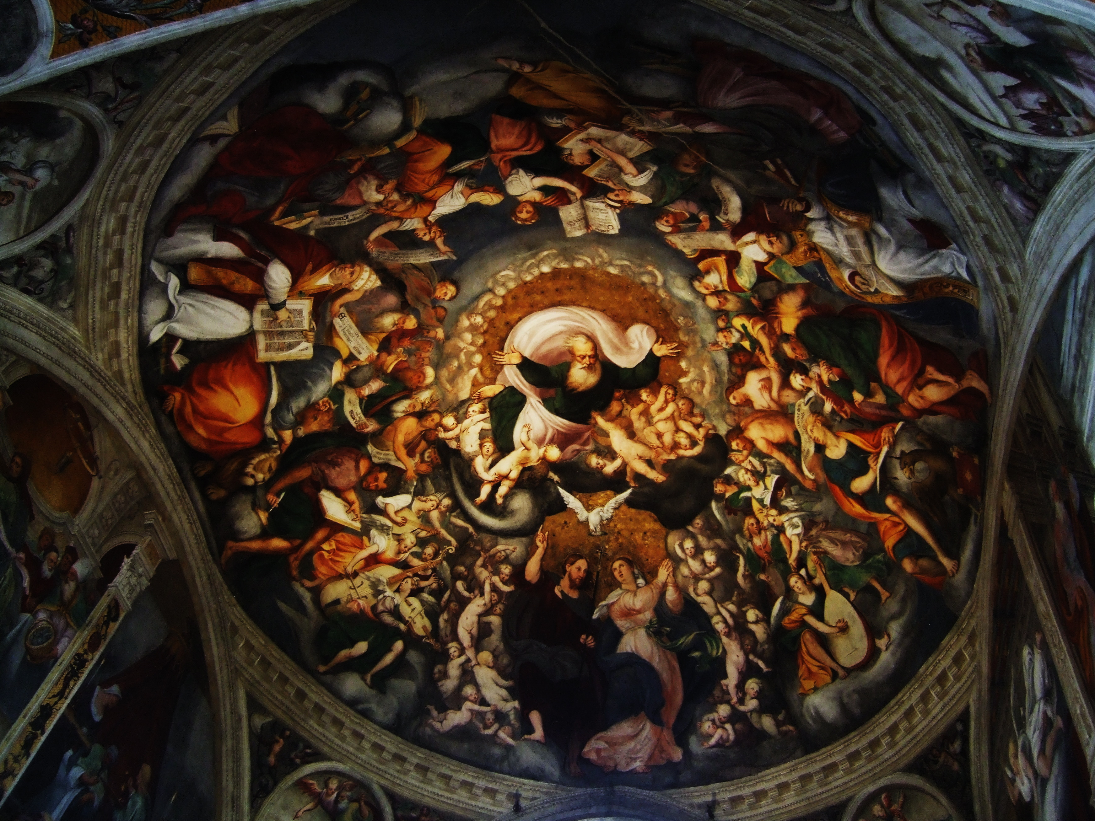 Pomponio Amalteo - Assunzione Vergine affresco San Vito al Tagliamento - Chiesa di Santa Maria dei Battuti